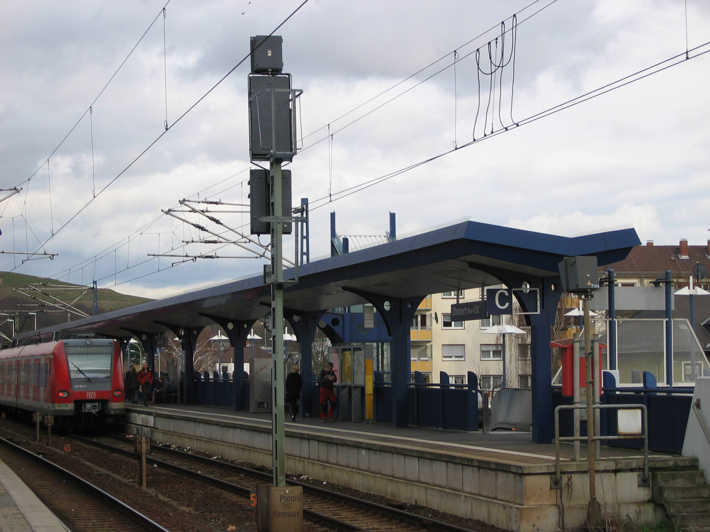 Train type 423 in Offenbach am Main-Ost, Germany, line S1 to Rödermark-Ober Roden, platform 1 / Baureihe 423 in Offenbach am Main-Ost, Linie S1 nach Rödermark-Ober Roden, Gleis 1